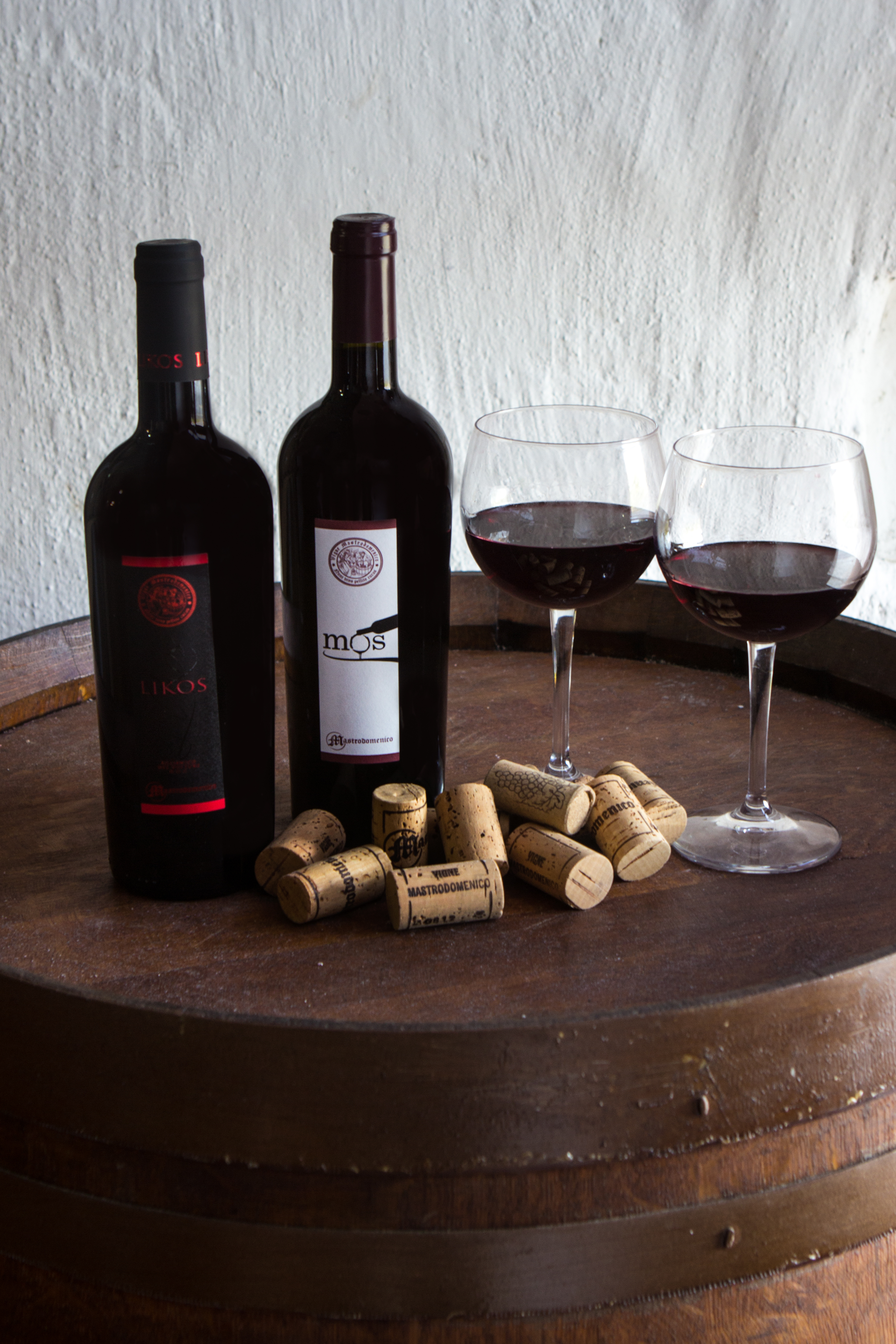 aglianico del vulture vigne mastrodomenico